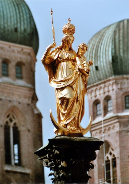 Die Mariensäule in München. Im Hintergrund die Türme der Frauenkirche Photograph: Florian Schott